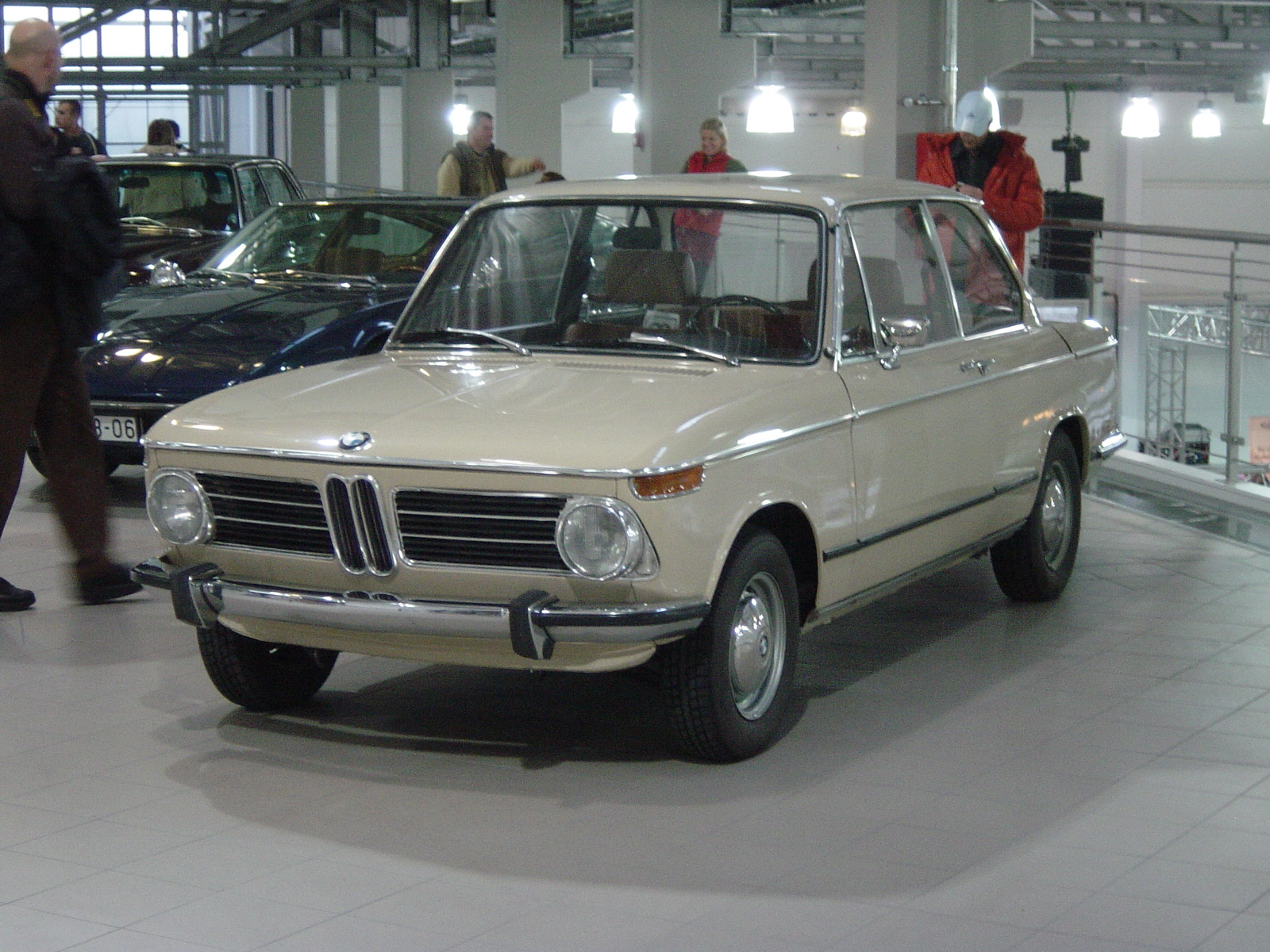 BMW